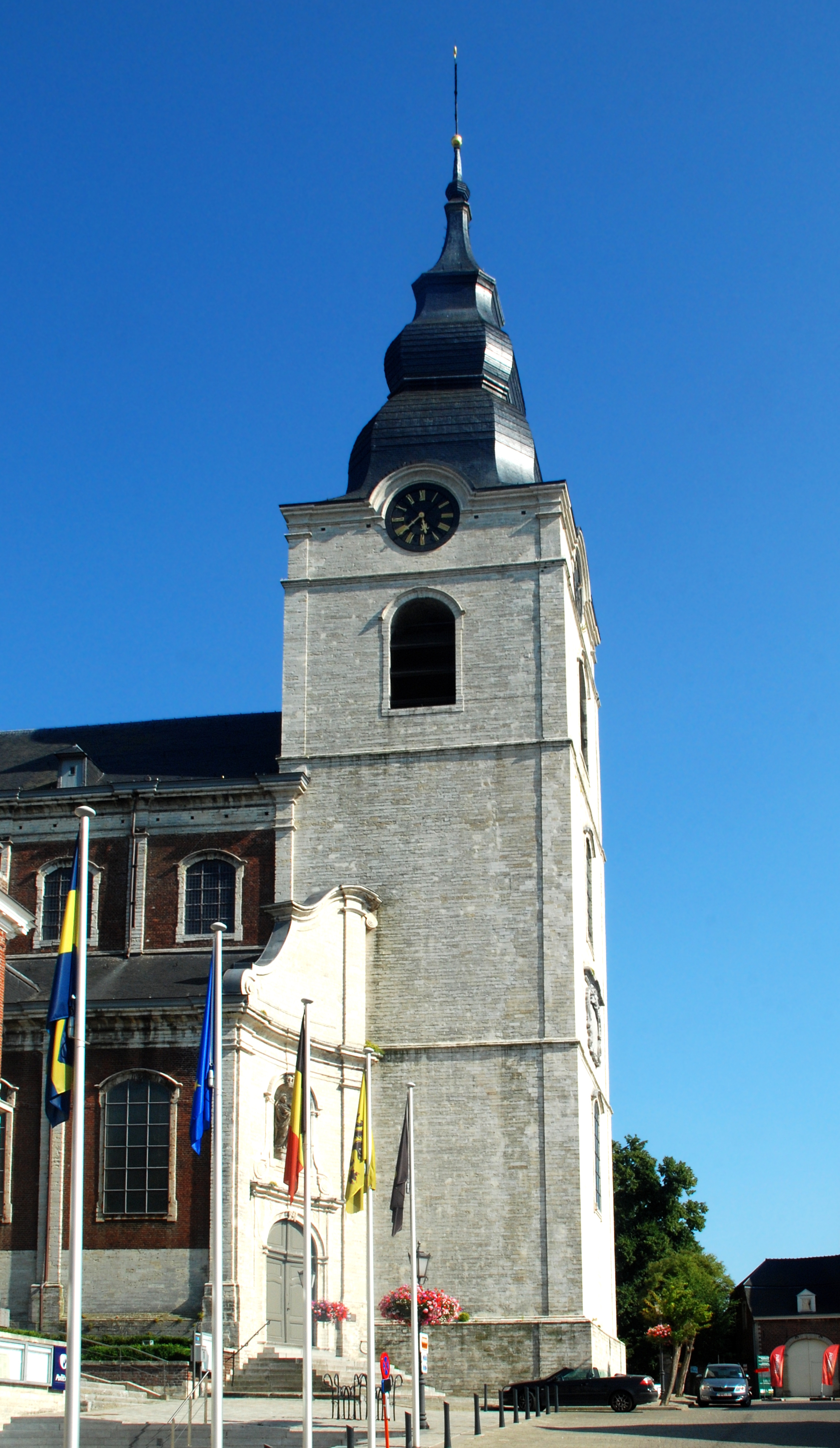 Belgique - Brabant flamand - Hoegaarden - Église Saint-Gorgon